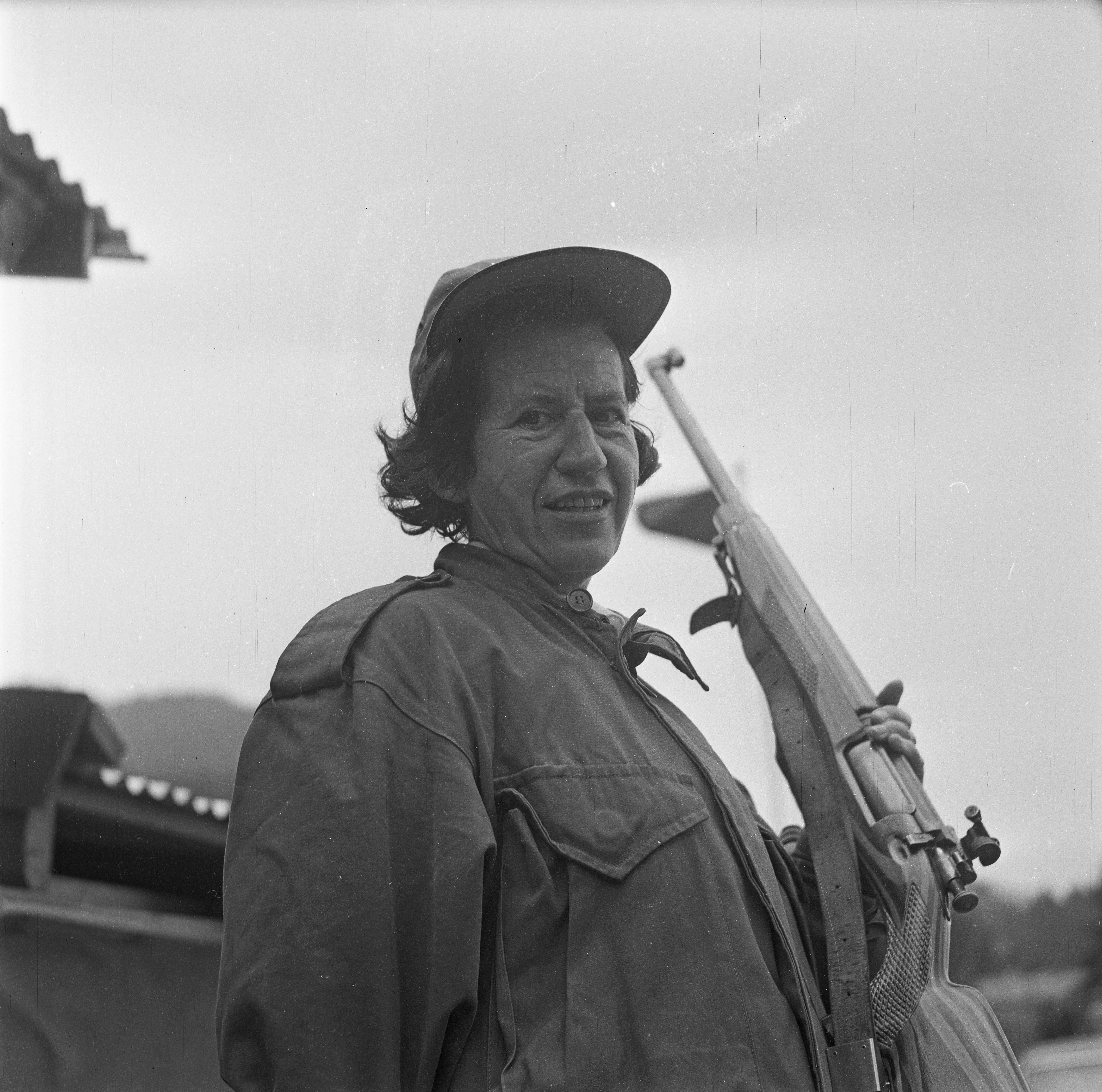 Guri Melleby, firedobbel skytterprinsesse (1955, 1962, 1963 og 1967), her avbildet i 1967